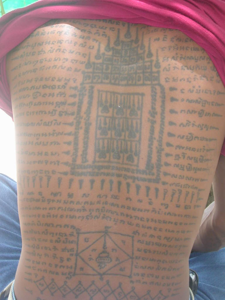 Thai tattoos (สักยันต์)